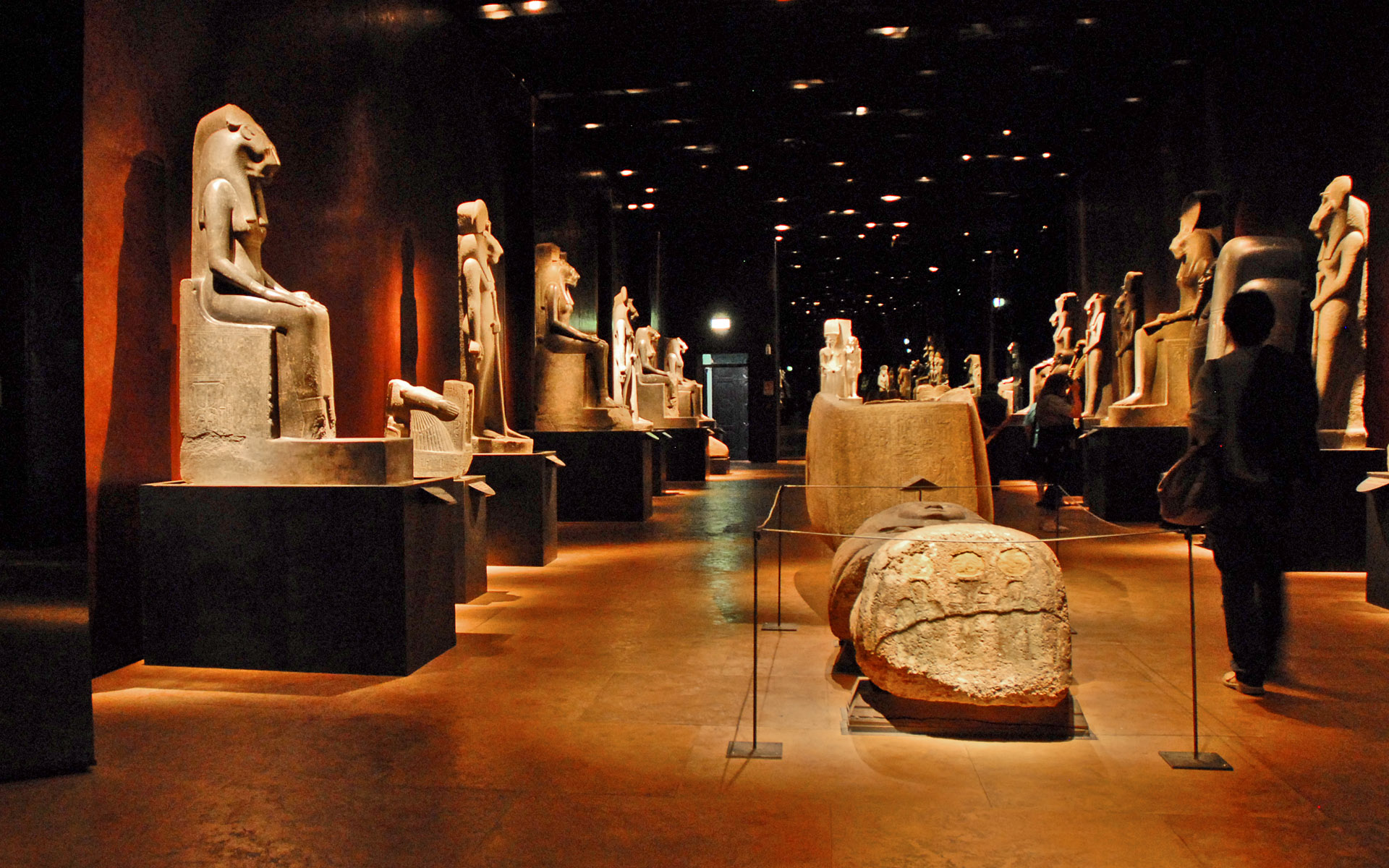 salle des statues monumentales du musée égyptien